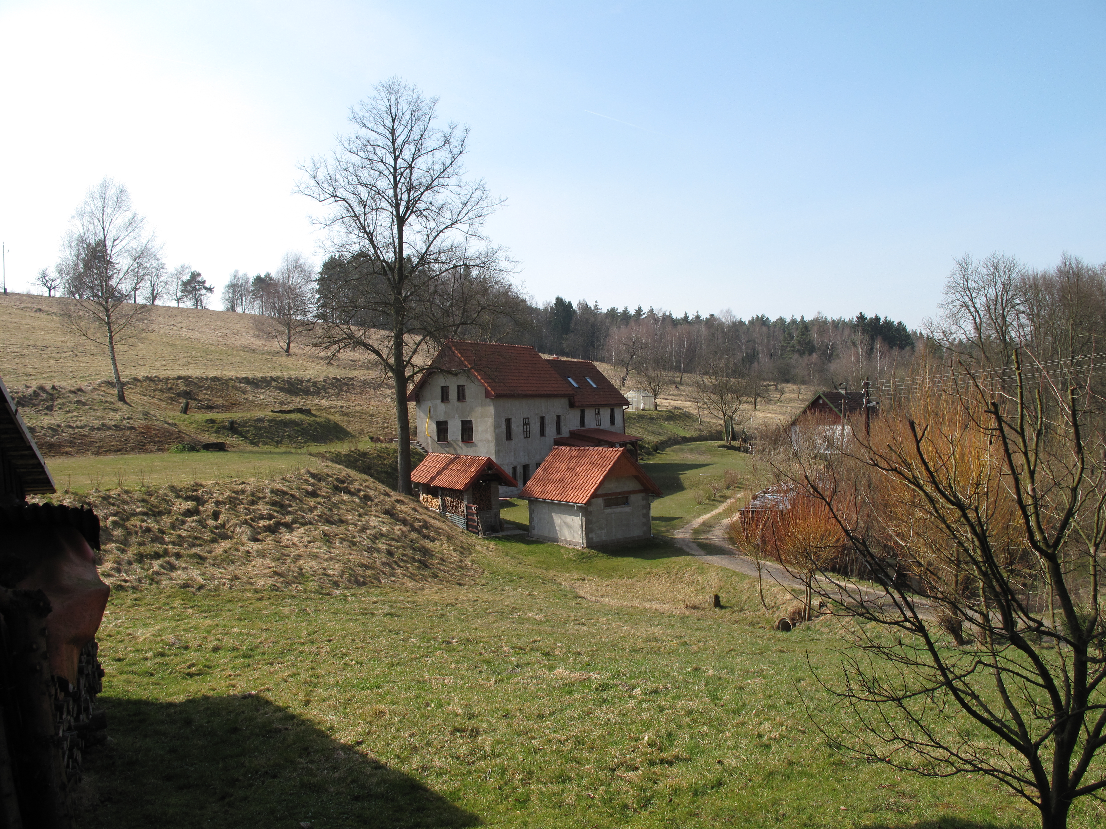 Dolík v Cetenově. Okres Liberec, Česká republika.